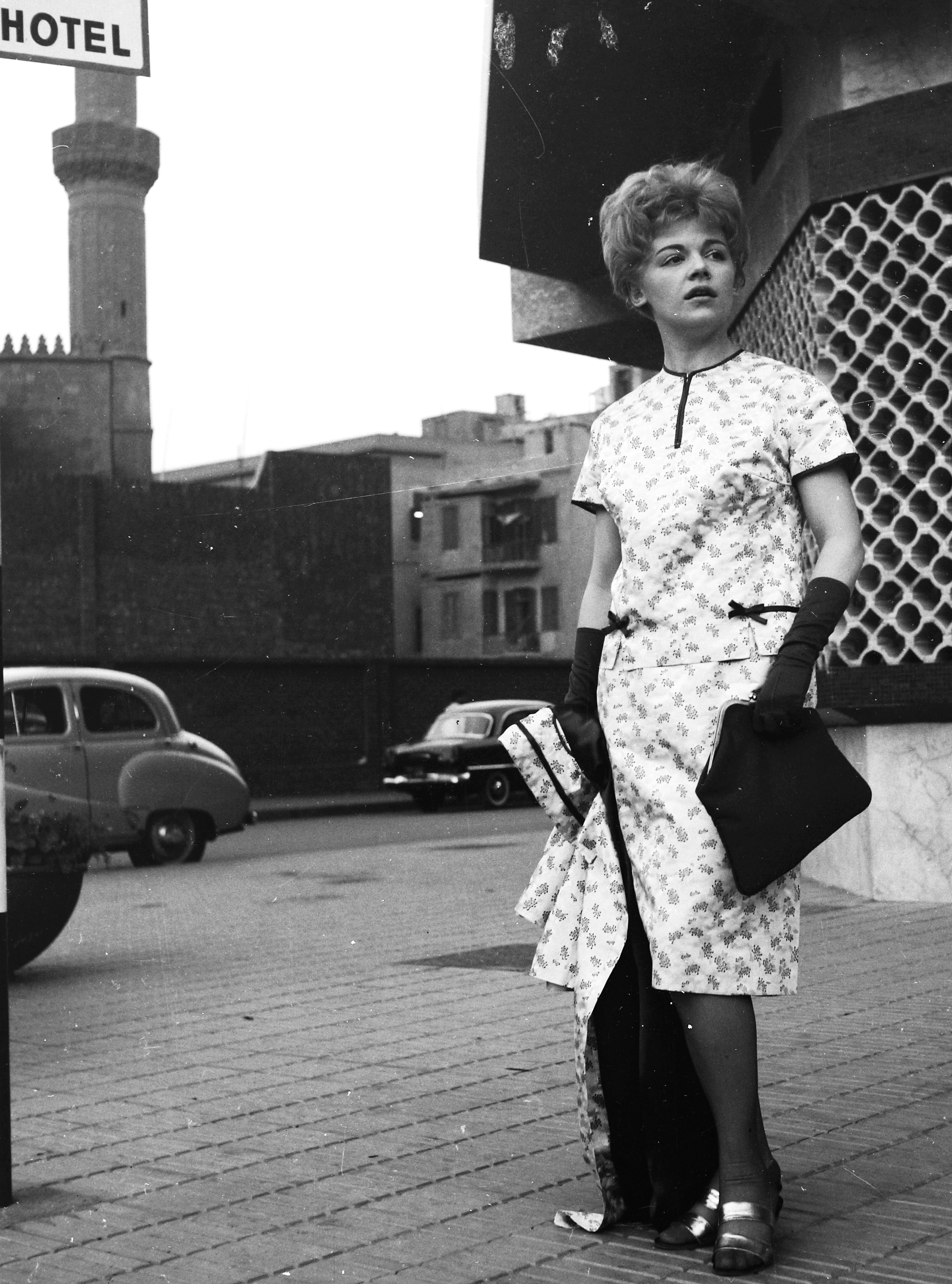 Egyiptom 1962. Krencsey Marianne színművésznő. A felvétel az Egyiptomi történet című film forgatása alkalmával készült.